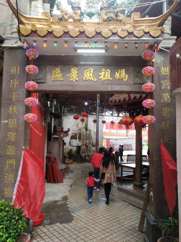 中文（中国大陆）: 这是丰顺留隍县的留隍天后圣母宫。